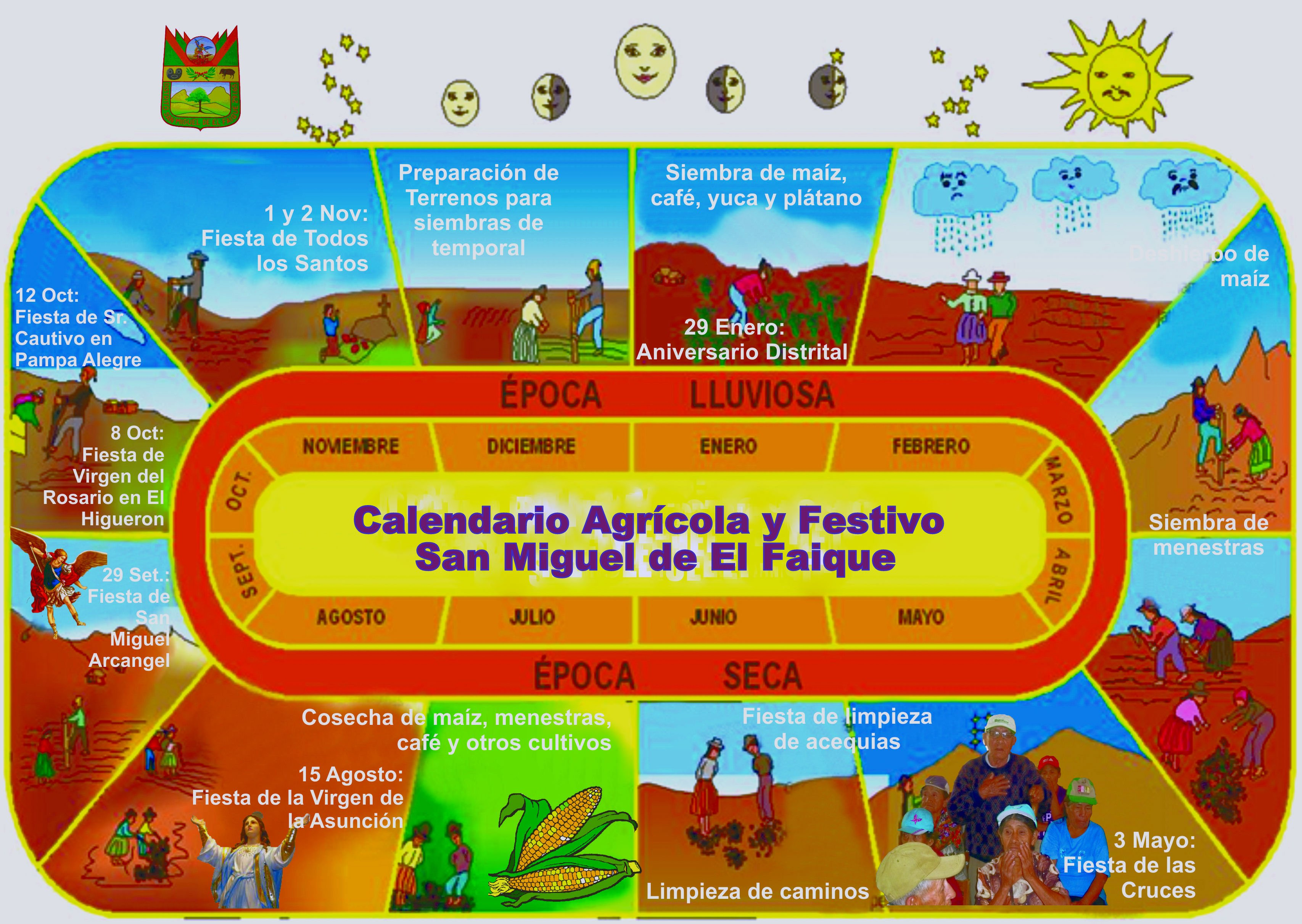 Annual, Agricultural and Holiday Calendar of the District of San Miguel de El Faique, Piura-Peru